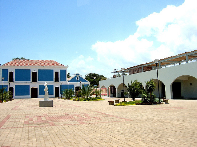 Plaza ubicada frente a la Vela de Coro, Estado Falcón, Venezuela